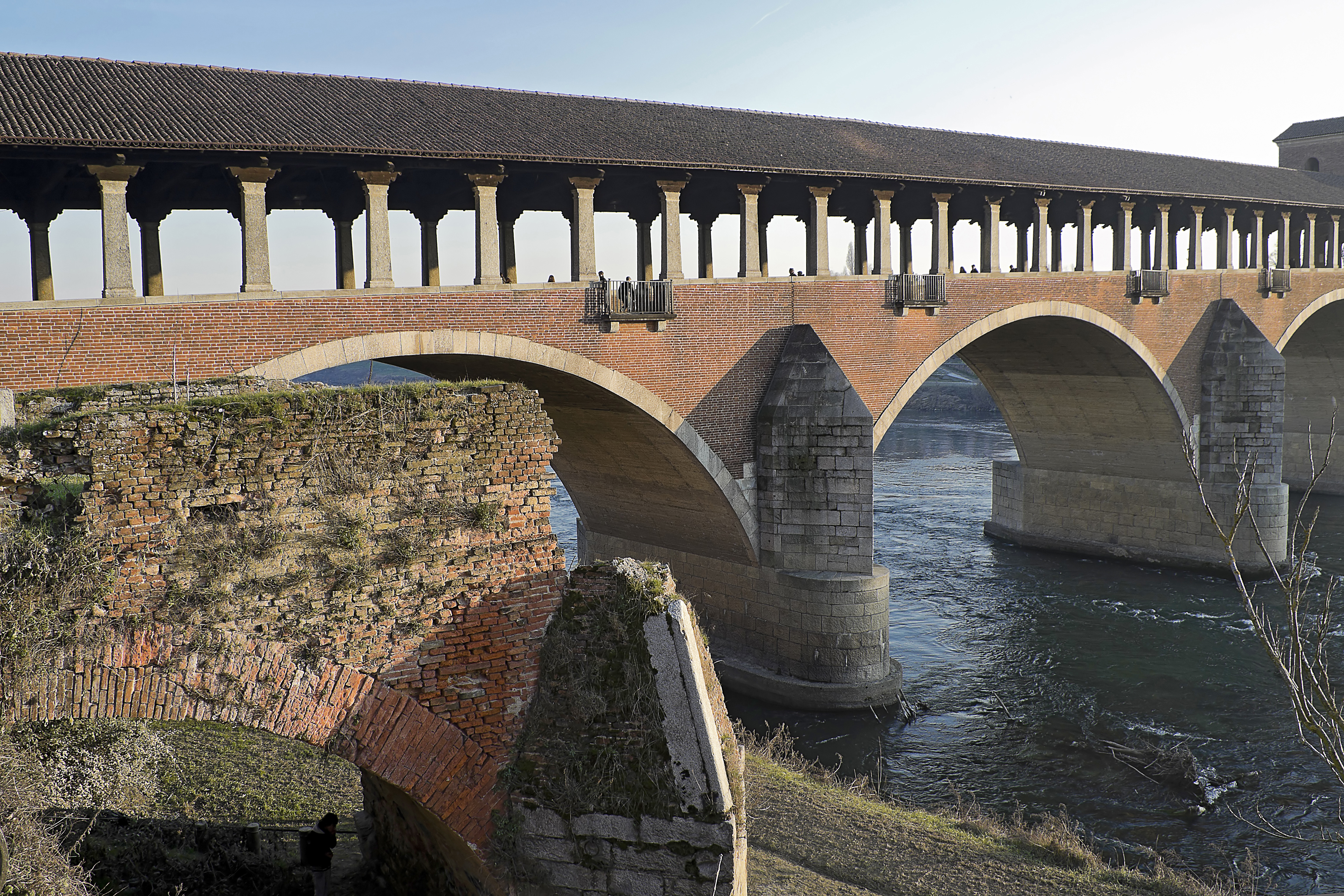 Pavia ruderi ponte romano sullo sfondo il ponte coperto nuovo This is a photo of a monument which is part of cultural heritage of Italy.